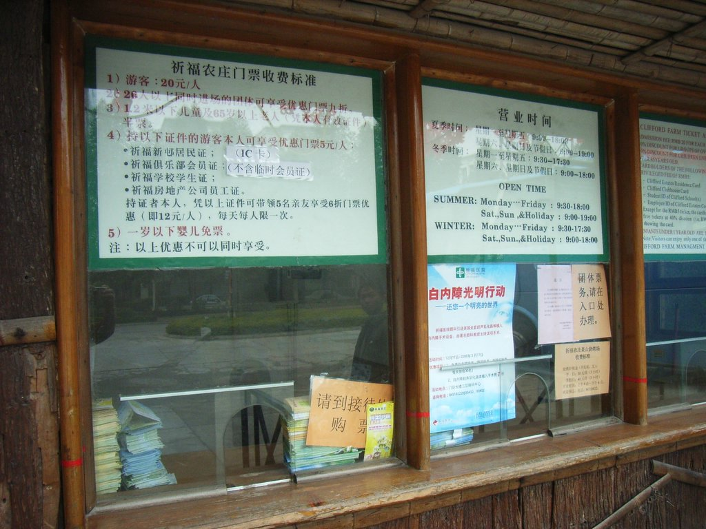 Guangdong Panyu Clifford Estate, China.